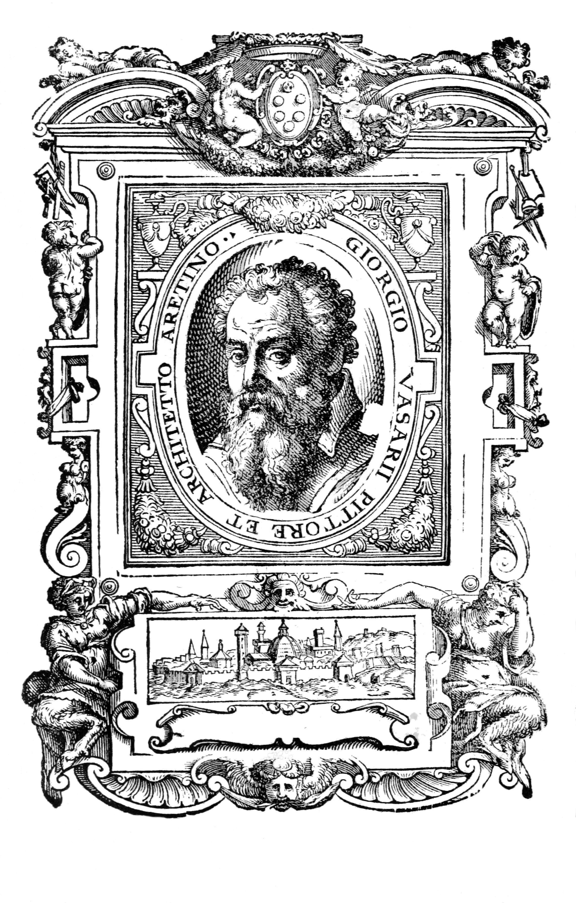 da Le vite de’ piu eccellenti pittori, scultori, et architettori, Firenze, 1568. Vol. 1, p. [16].